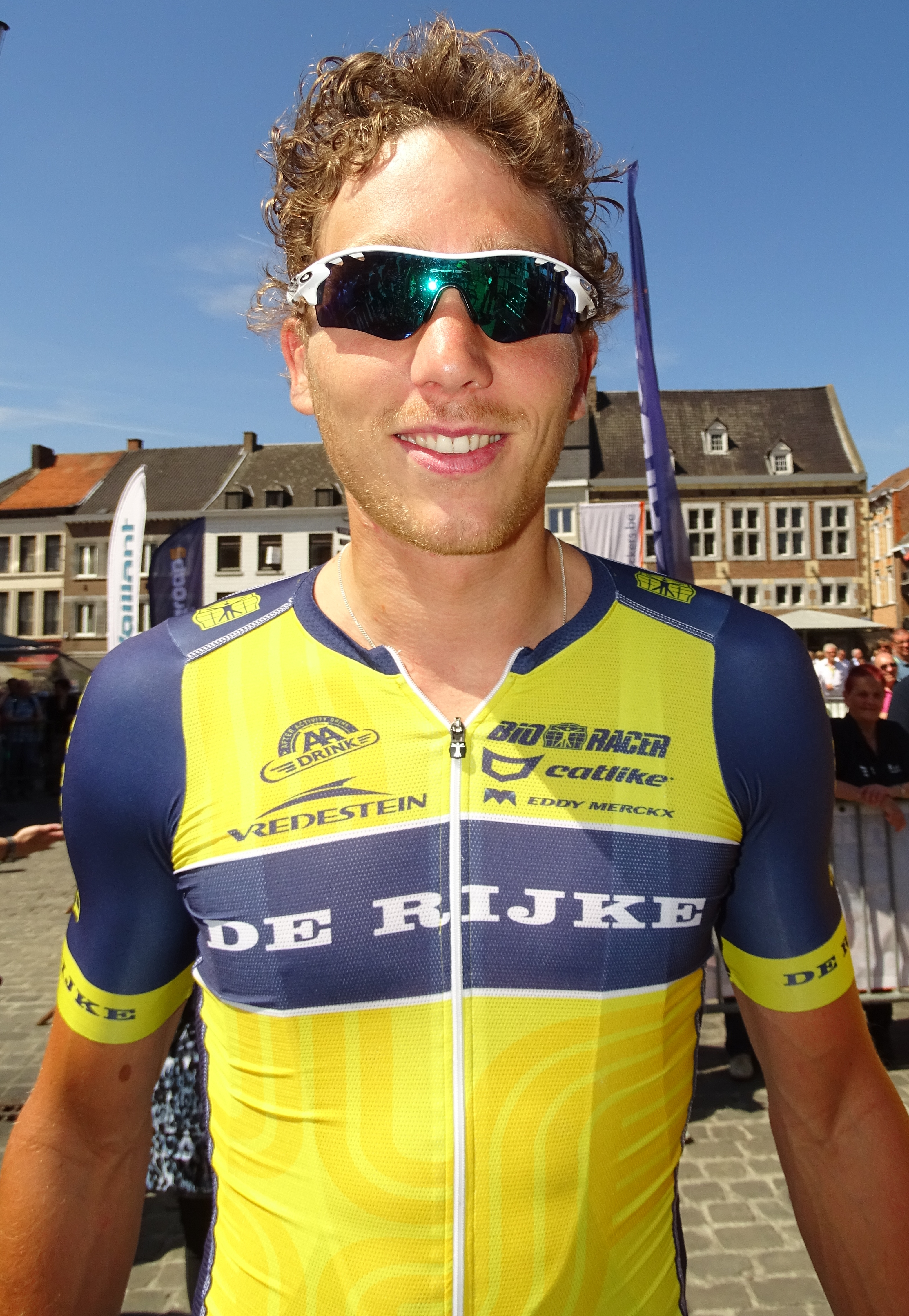 Reportage réalisé le dimanche 14 juin à l'occasion du départ et de l'arrivée du Tour du Limbourg 2015 à Tongres, Belgique.